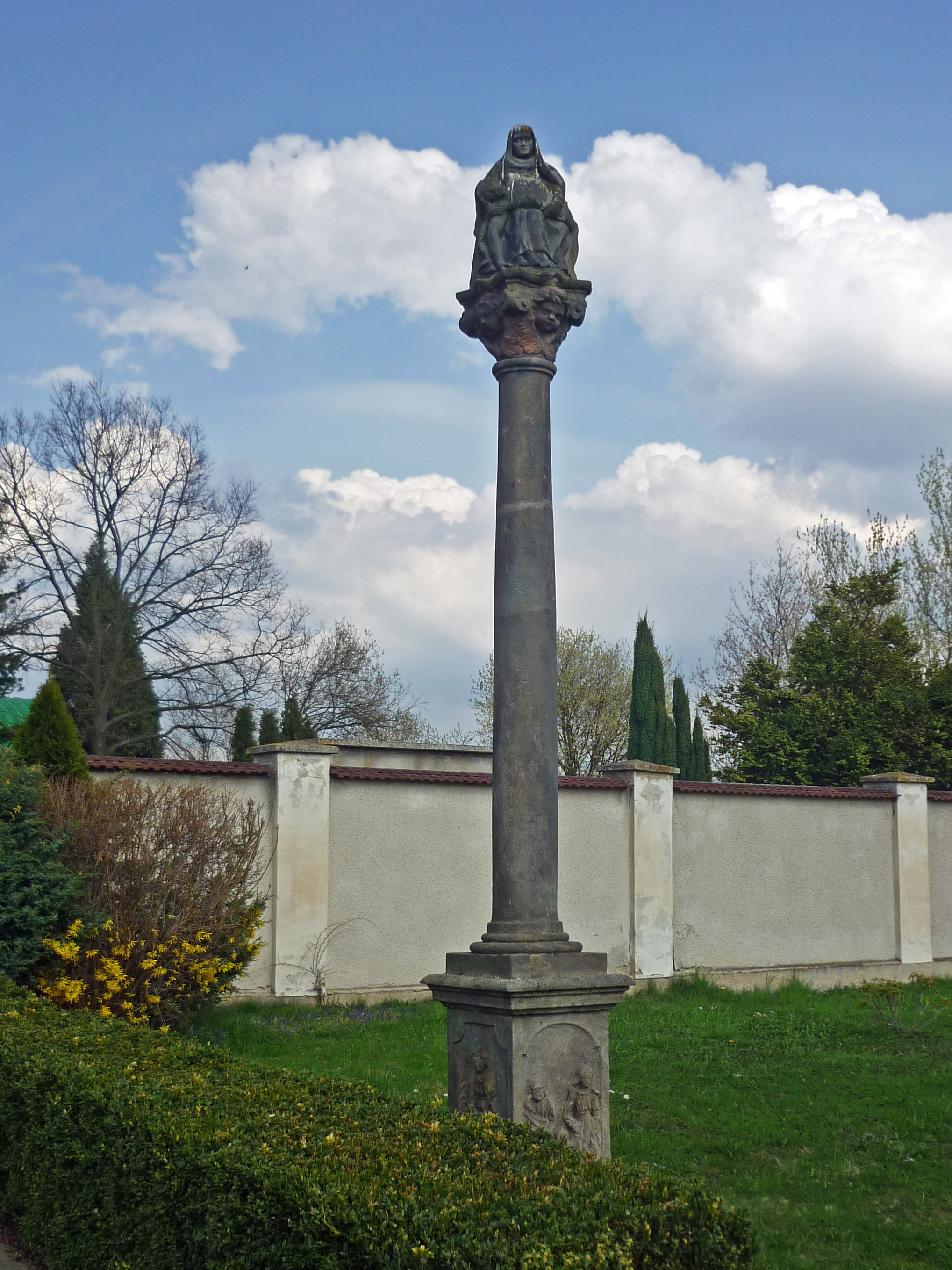 Säule mit Pietà in Trupschitz (Strupčice)